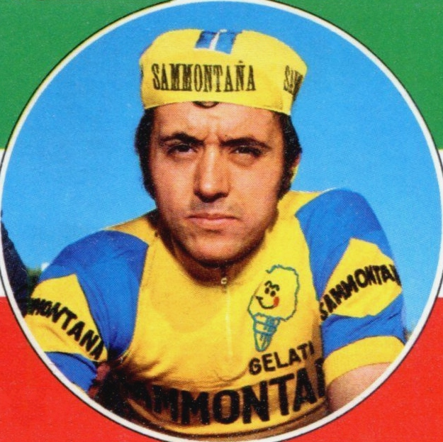 SPRINT '73 - PANINI - Figurina-Sticker n. 253 - WALTER RICCOMI - ITA -Rec